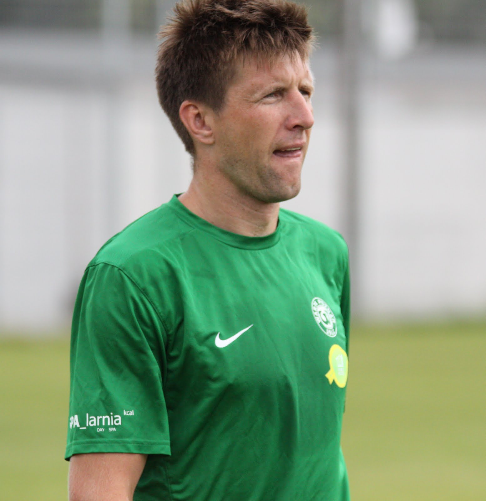 Grzegorz Rasiak na treningu Warty Poznań